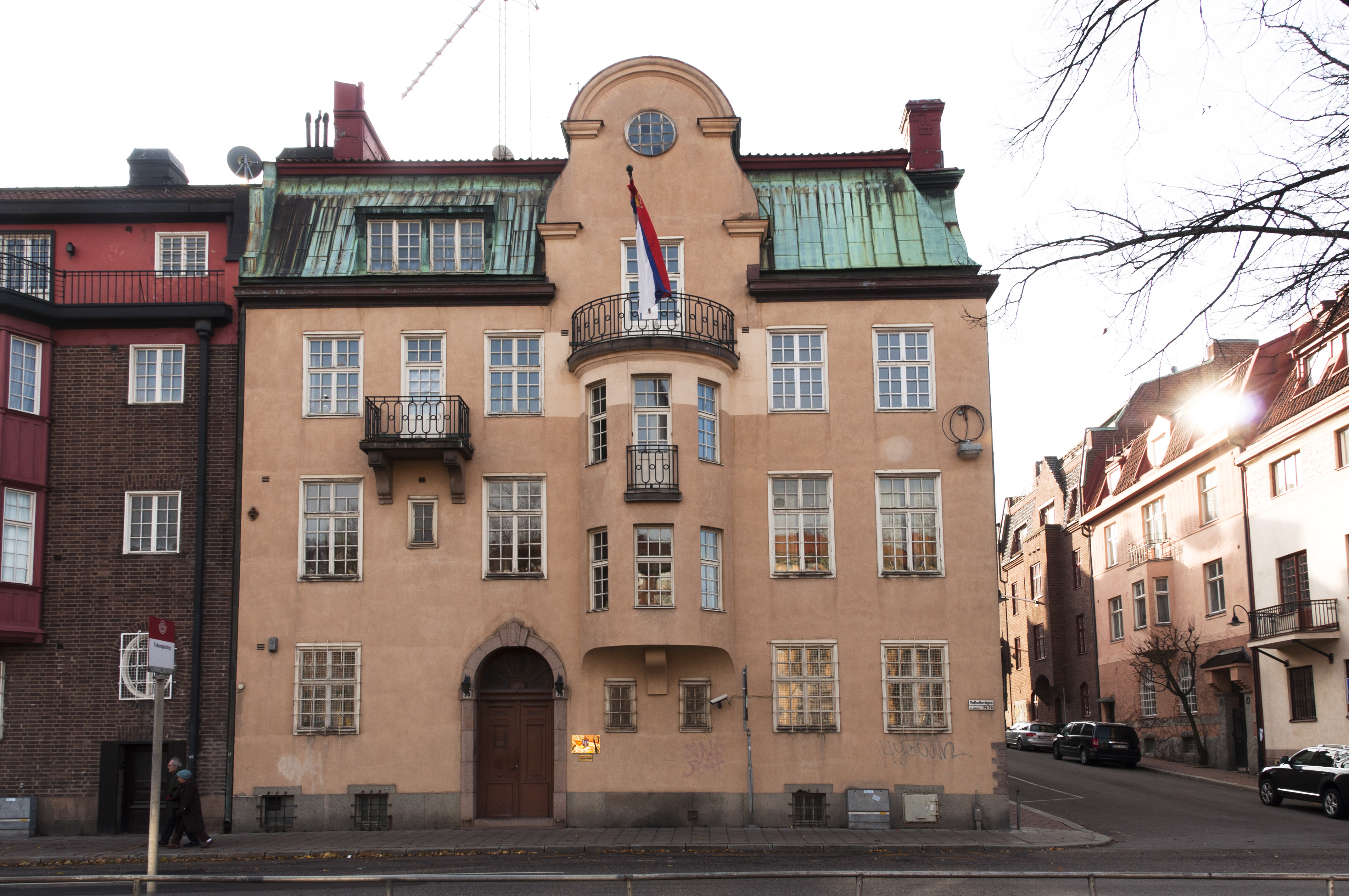 Valhallavägen 70/Baldersgatan 14 (Piplärkan 7): Byggnadsår 1910-11, arkitekt och byggherre Erik Josephson, byggmästare P Blom. Ursprungligen arkitektens egen bostad, numera Serbiens ambassad (tidigare Jugoslaviens ambassad). )